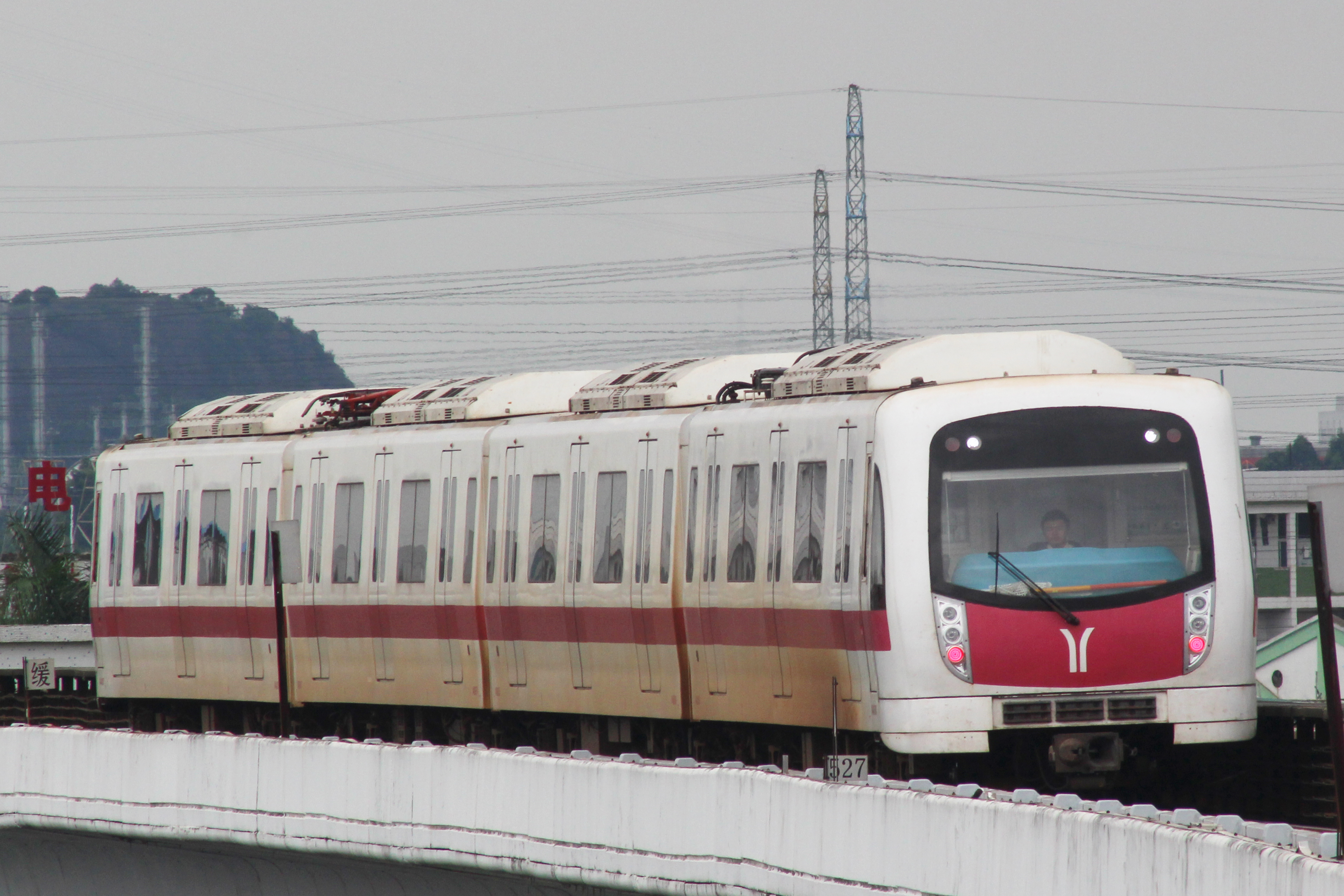 广州地铁4号线四方制L1型列车